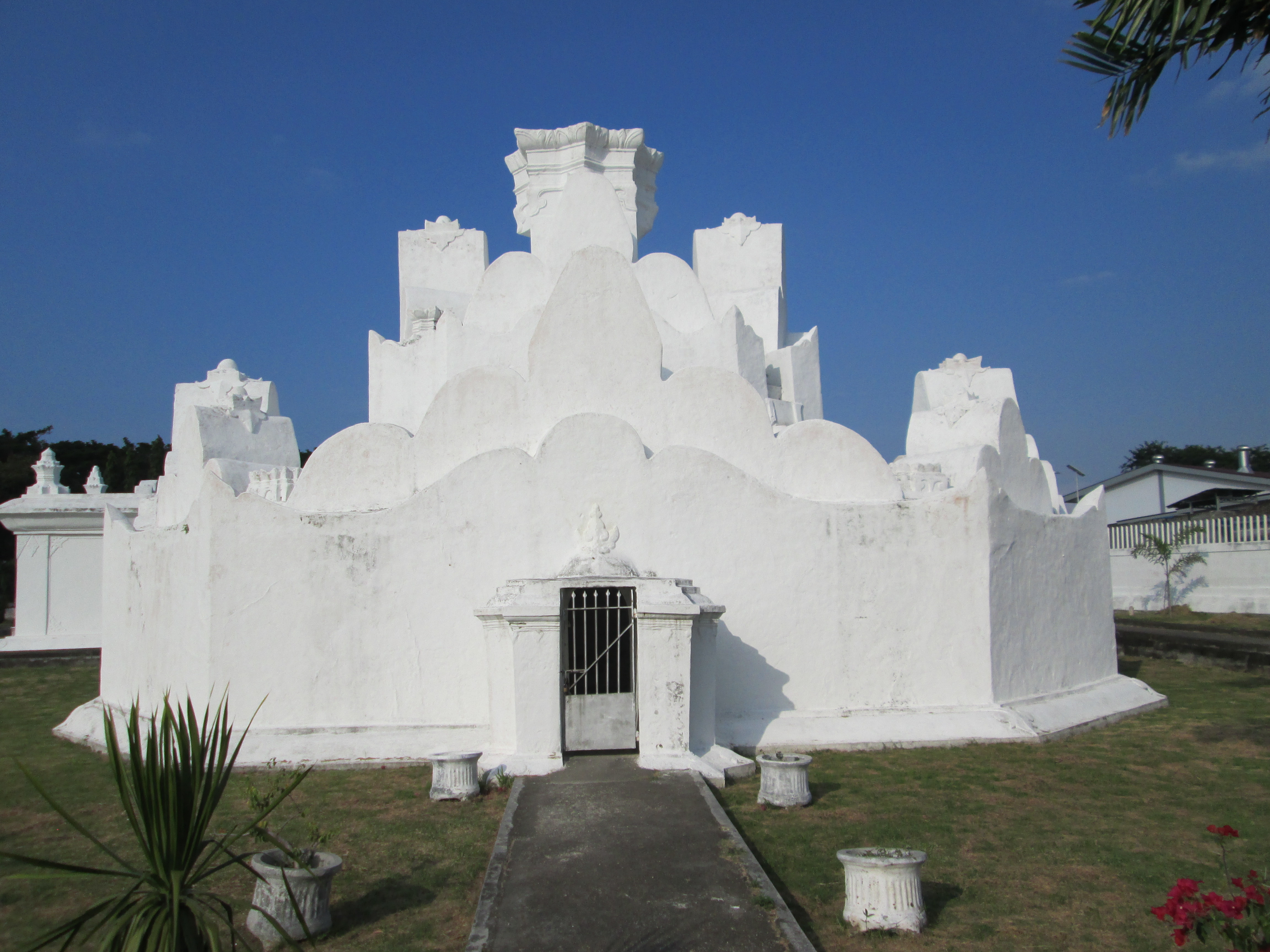 Acèh: Gunongan